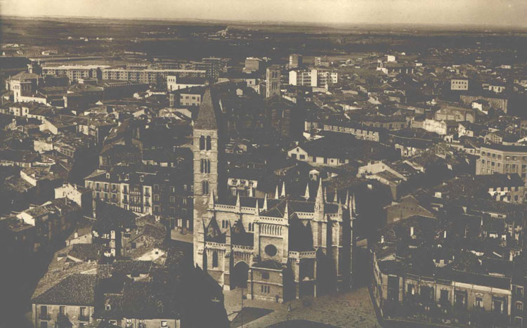 Iglesia de Santa María de la Antigua - Valladolid - Ed. GRECOR. Valladolid-Madrid - 74 Valladolid. Vista aérea de la Iglesia de la Antigua. - Tarjeta postal. Papel 139 x 88 mm B/N